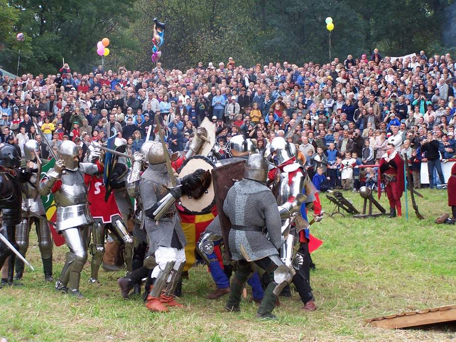 Dębno, Turniej Rycerski 2004.